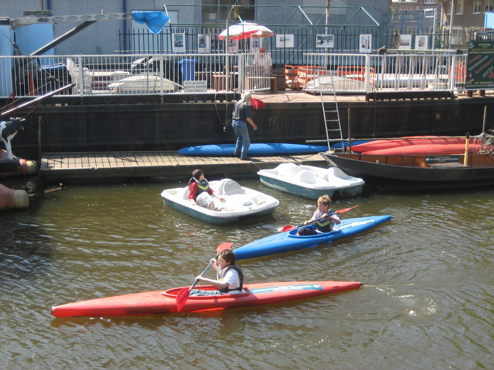 Watersportcentrum in de Van Noordtgracht in Amsterdam Westerpark